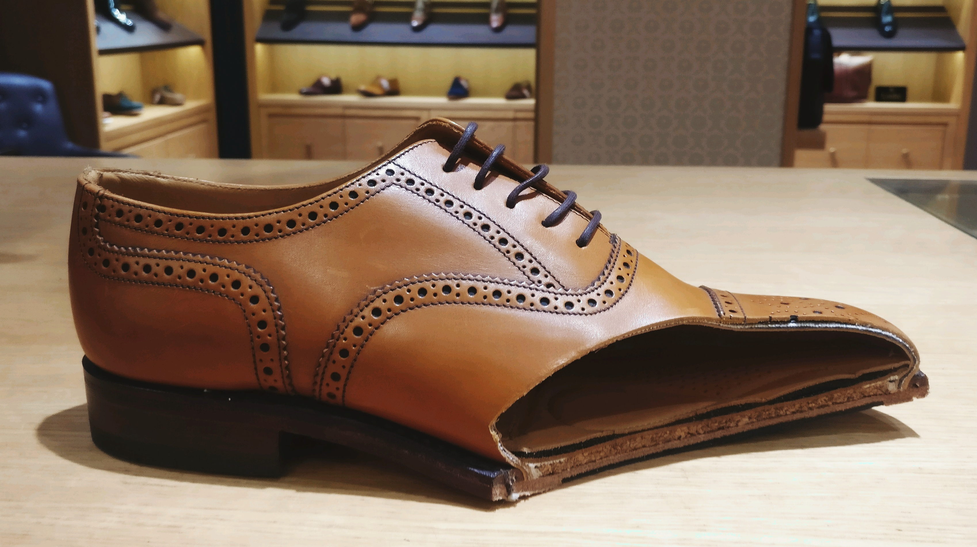 Przekrój buta Loake